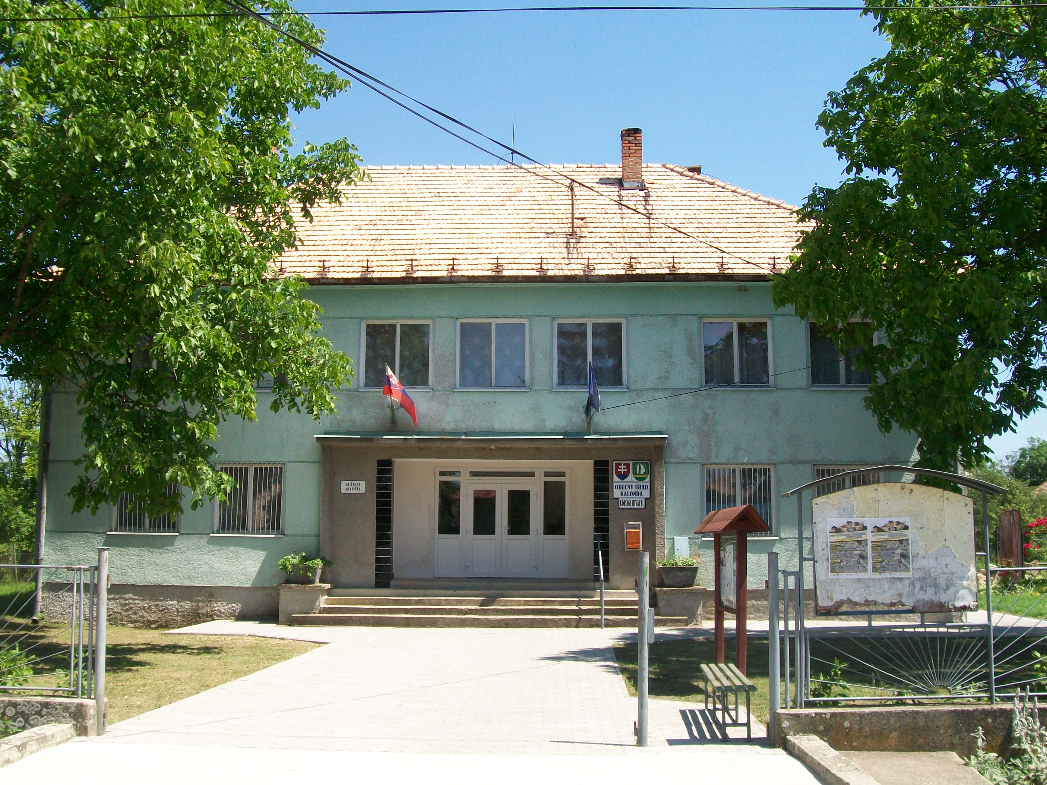 Obecný úrad v Kalonde